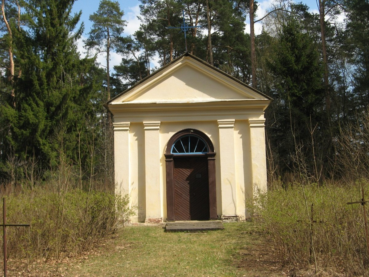 Вялікая Сэрвач. Капліца-пахавальня Козел-Паклеўскіх